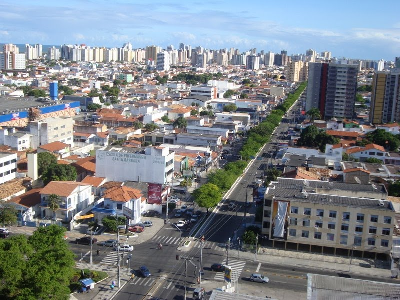 Vista de cima da Avenida Hermes Fontes